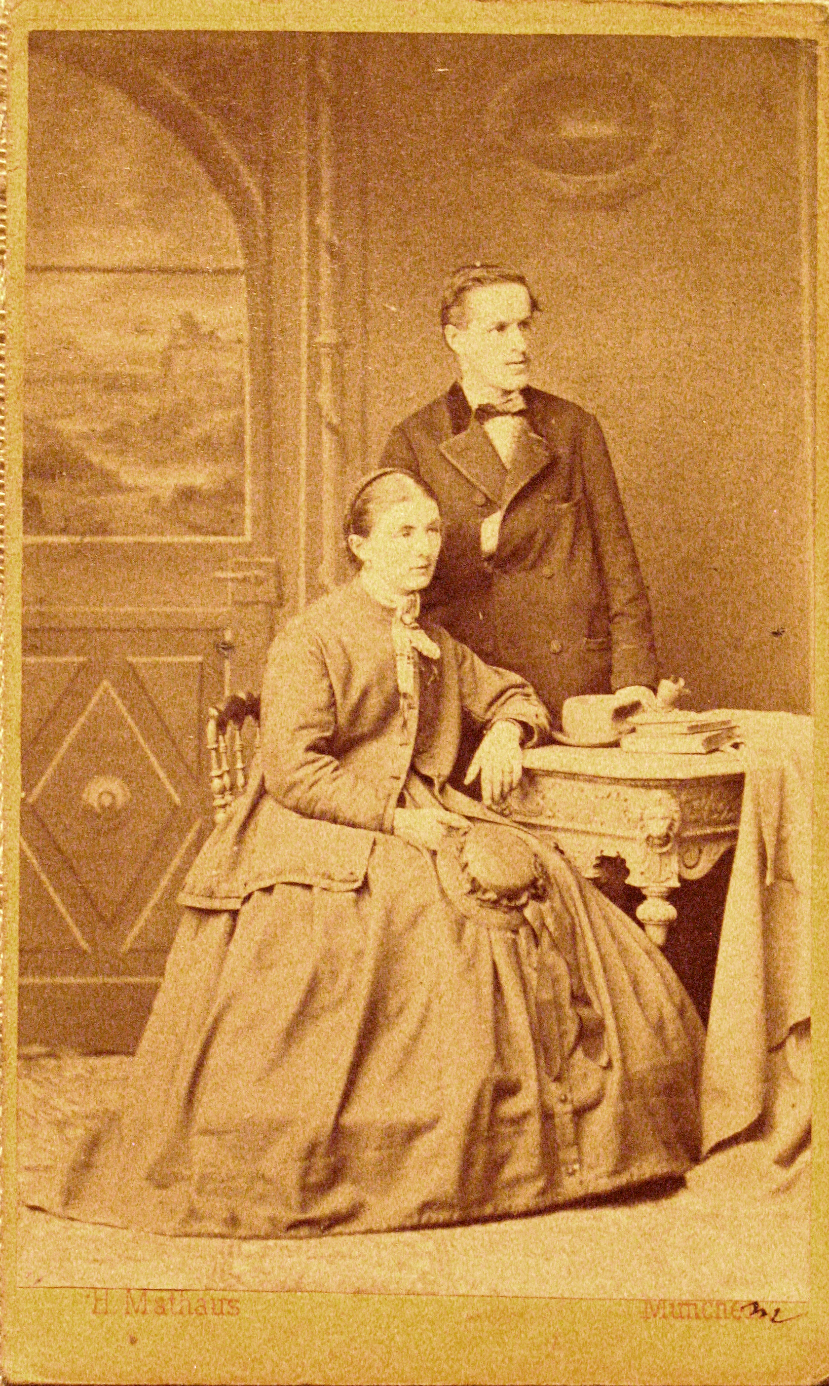 Josef Moroder-Lusenberg and wife Annamaria Sanoner